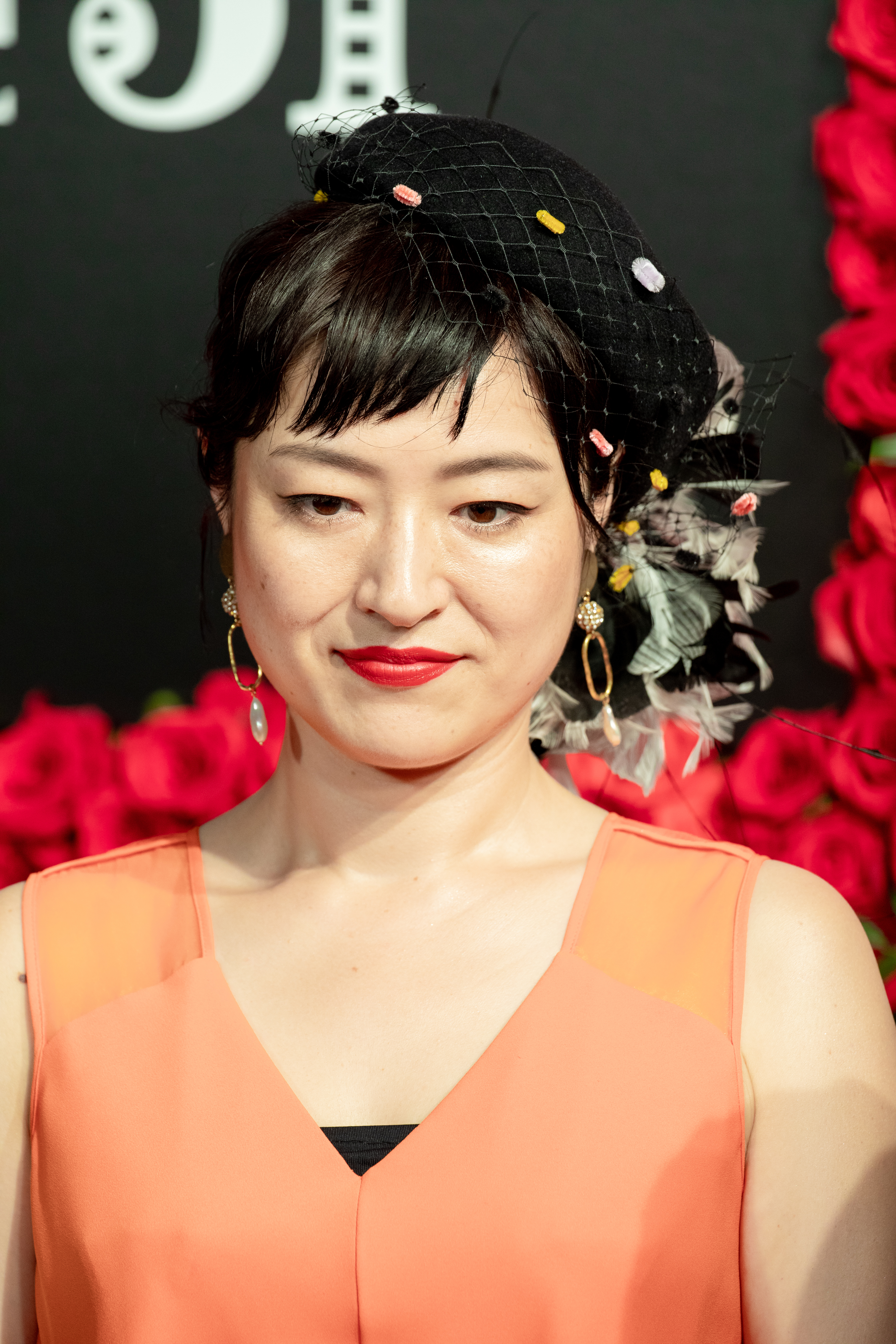 第30回 東京国際映画祭 オープニングセレモニー しゅはまはるみ (カメラを止めるな!)